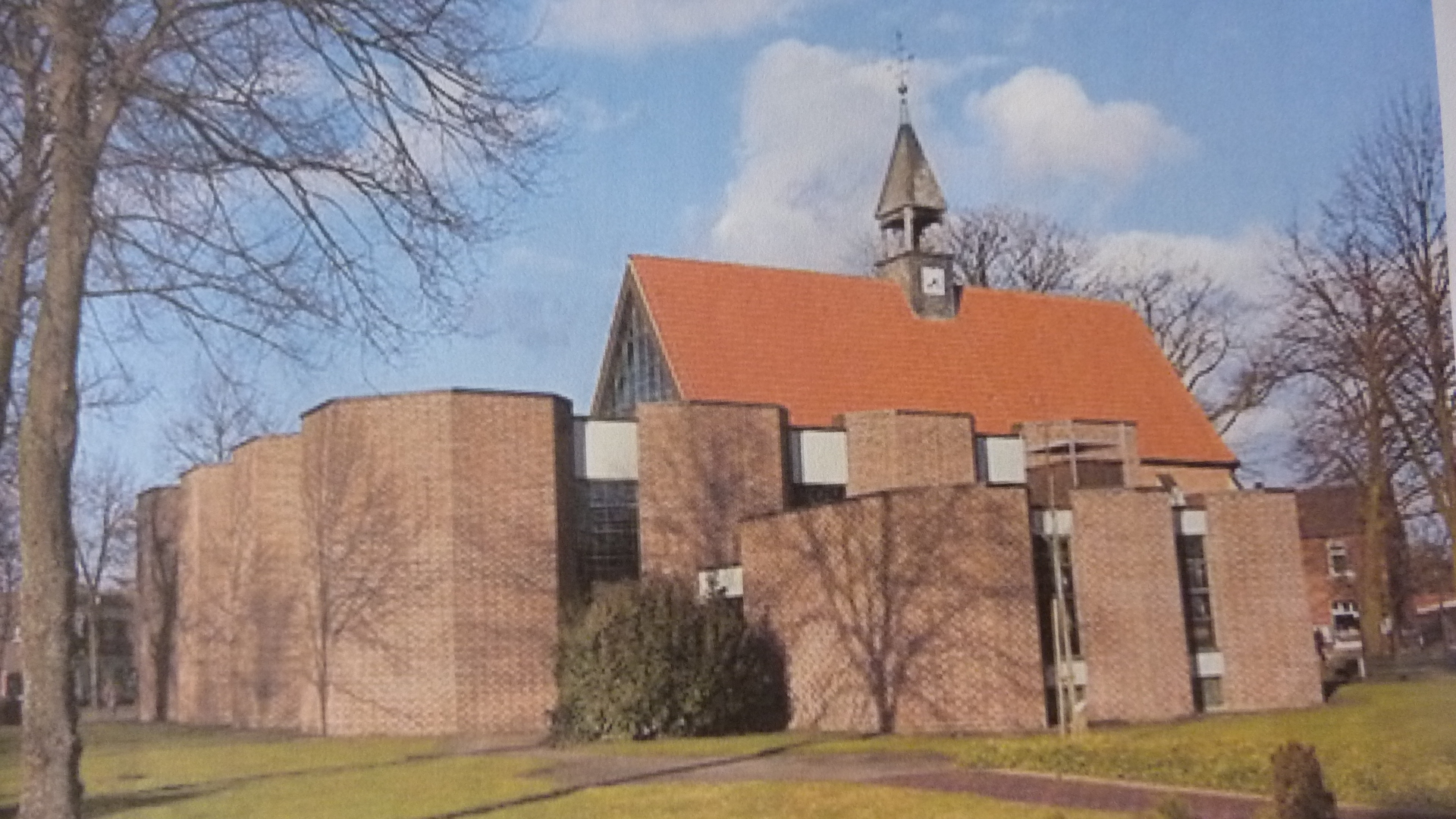 St. Anna Davensberg mit dem Neubau